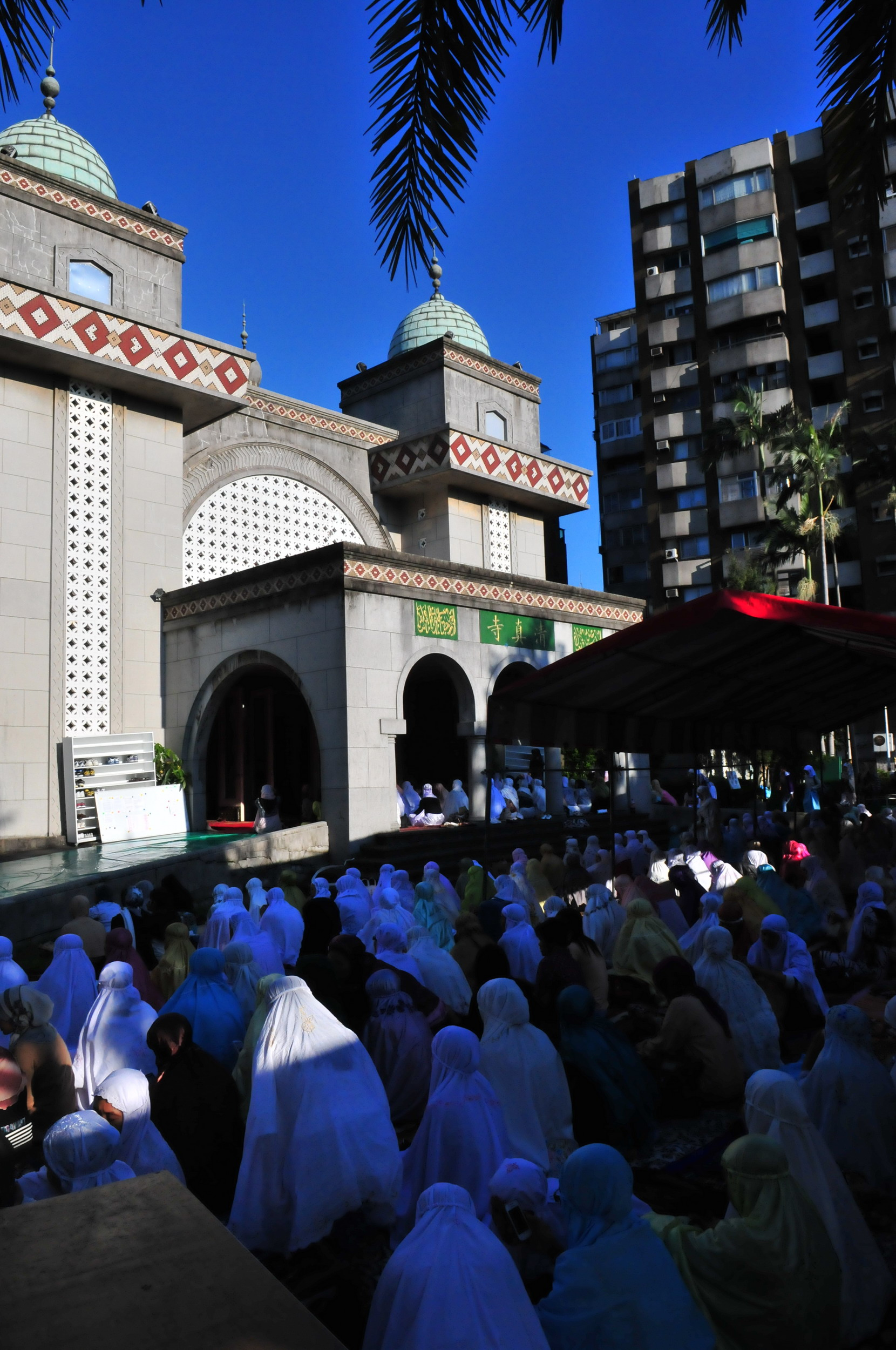 台北清真寺外，進行開齋會禮的穆斯林。